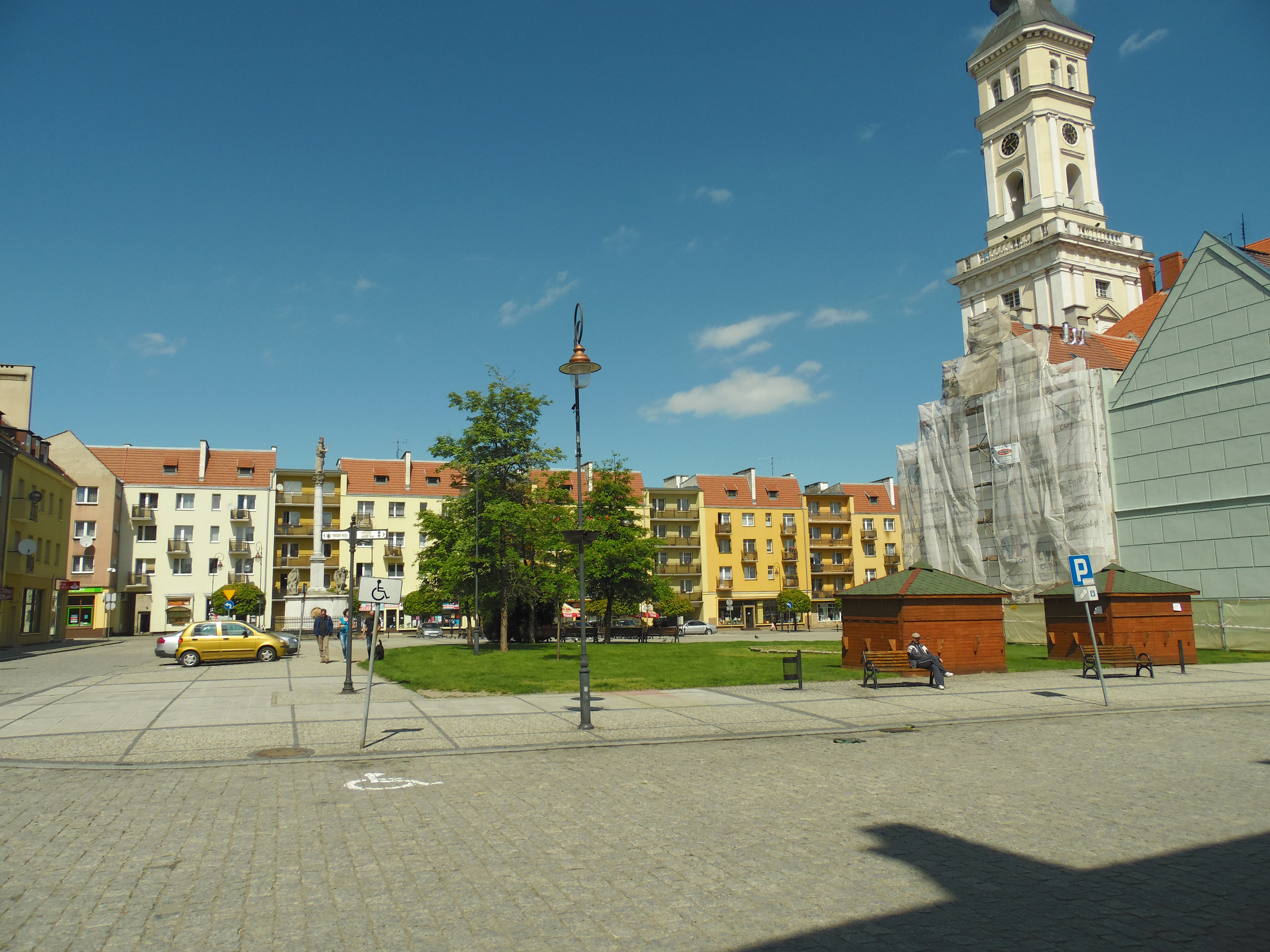 Prudnik, ratusz (XVIII w., 1840) 10.1958. Pierwotnie miała polski napis, został zlikwidowany za Fryderyka II na jego koszt